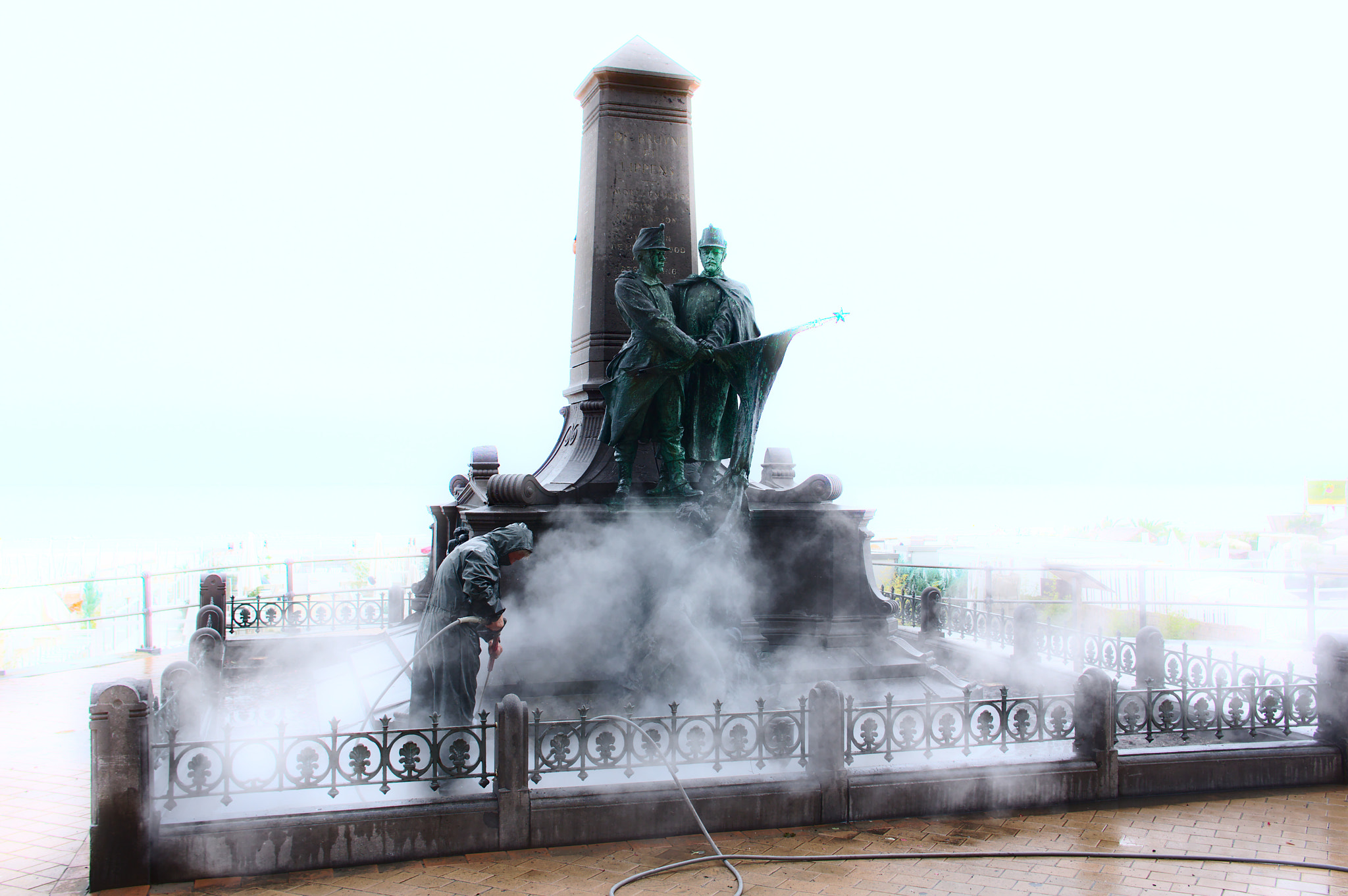 500px provided description: [#Steam ,#Monument ,#Belgium ,#Blankenberge ,#Lippens & De Bruyne]